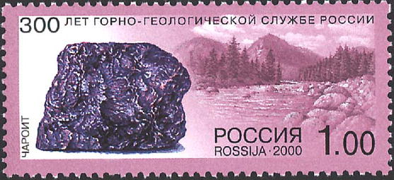 Марка России 2000 года из серии «300-летие горно-геологической службы России. Минералы» с изображением минерала чароита. Художник — И.Козлов. № 613 по каталогу ИТЦ «Марка». Тираж — 300 тыс. экз.